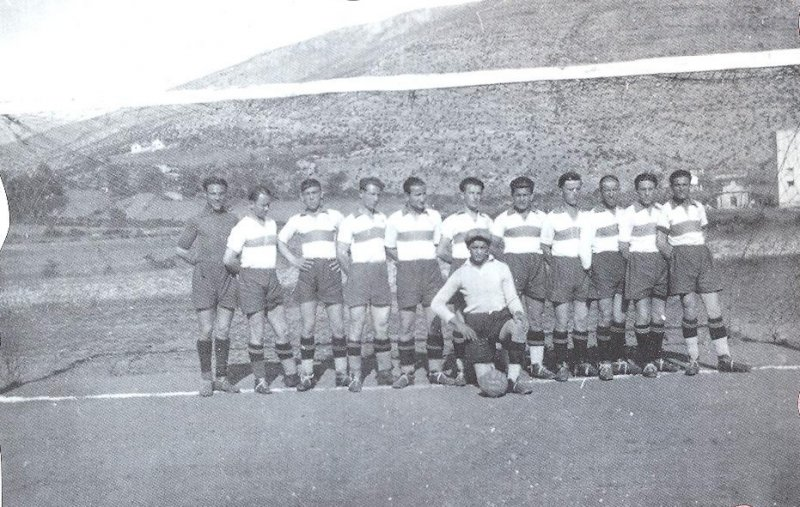 Momčad HŠK Zrinjskog na igralištu kod vojarne Sjeverni logor, Mostar.